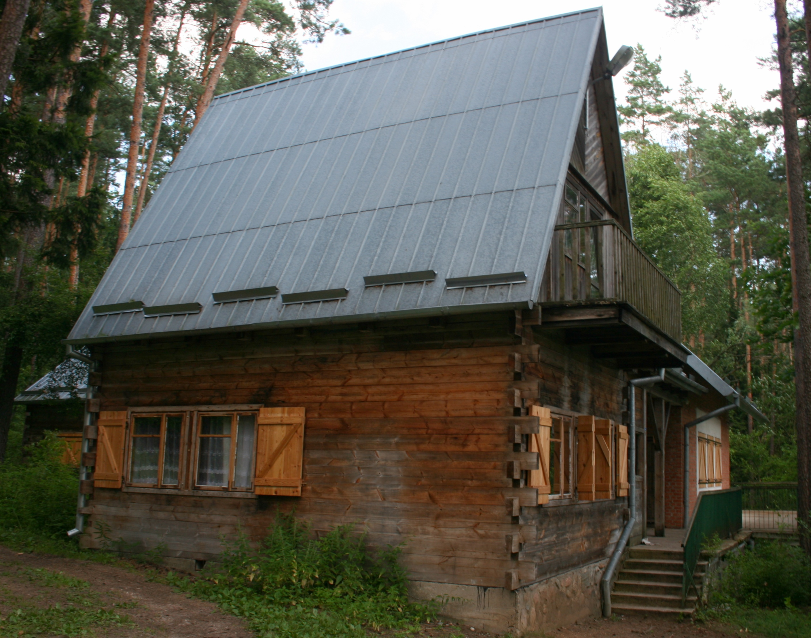 Słupie - Ośrodek Edukacji Środowiskowej nad jeziorem Wigry, Wigierski Park Narodowy